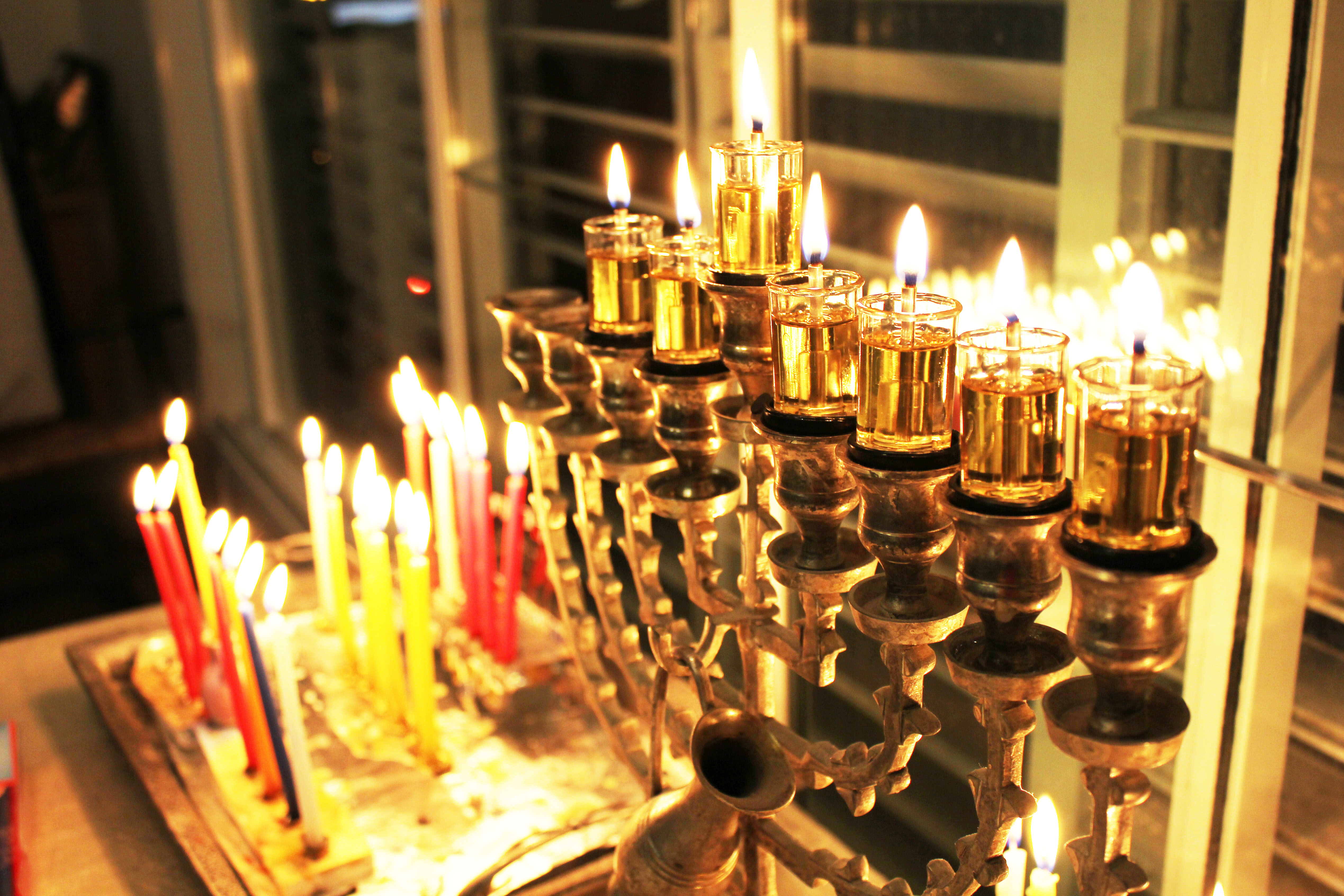 Hanukkah Hanukkah